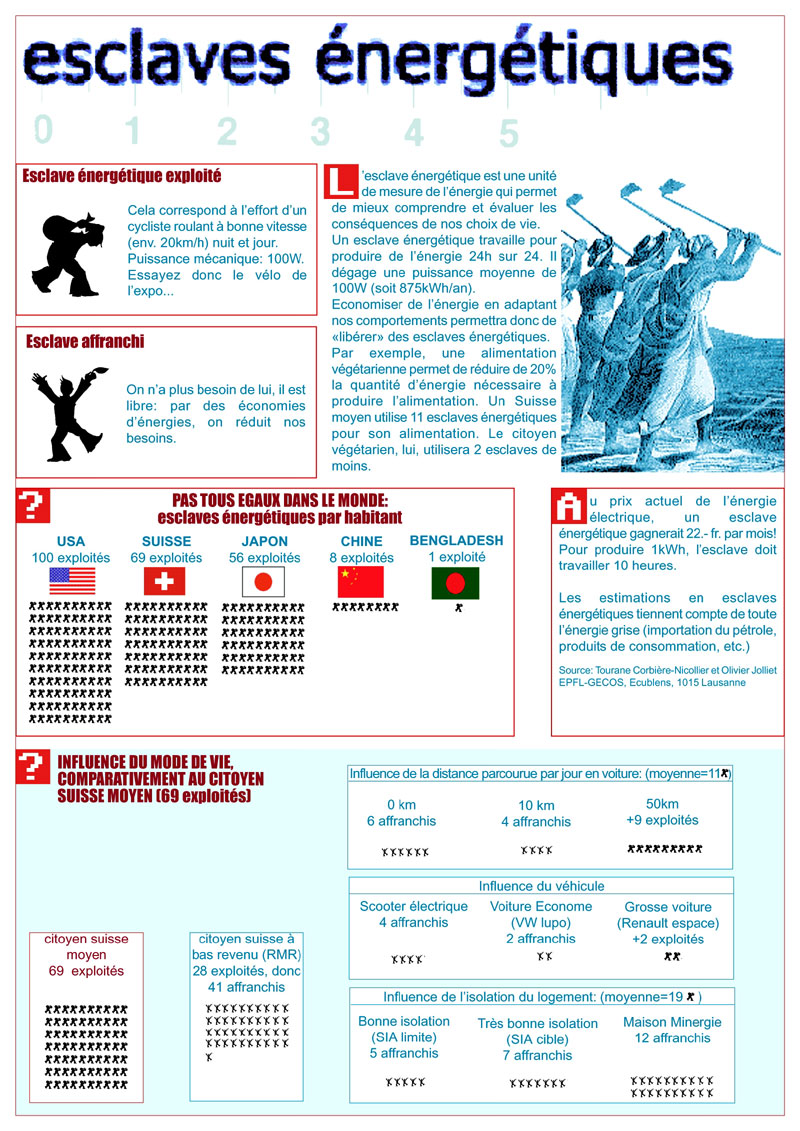 En Suisse, en 2001, une exposition présente une définition vulgarisée des "esclaves énergétiques" sous la forme d'un poster. Ce poster a été élaboré sur la base des travaux menés par Tourane Corbière-Nicollier sous la tutelle d'Olivier Joillet du laboratoire EPFL-GECOS à Lausanne. La définition donnée est "L'esclave énergétique est une unité de mesure qui permet de mieux comprendre et évaluer les conséquences de nos choix de vie. Un esclave énergétique travaille pour produire de l'énergie 24h sur 24. Il dégage une puissance moyenne de 100W ( soit 875 kwh/an )."